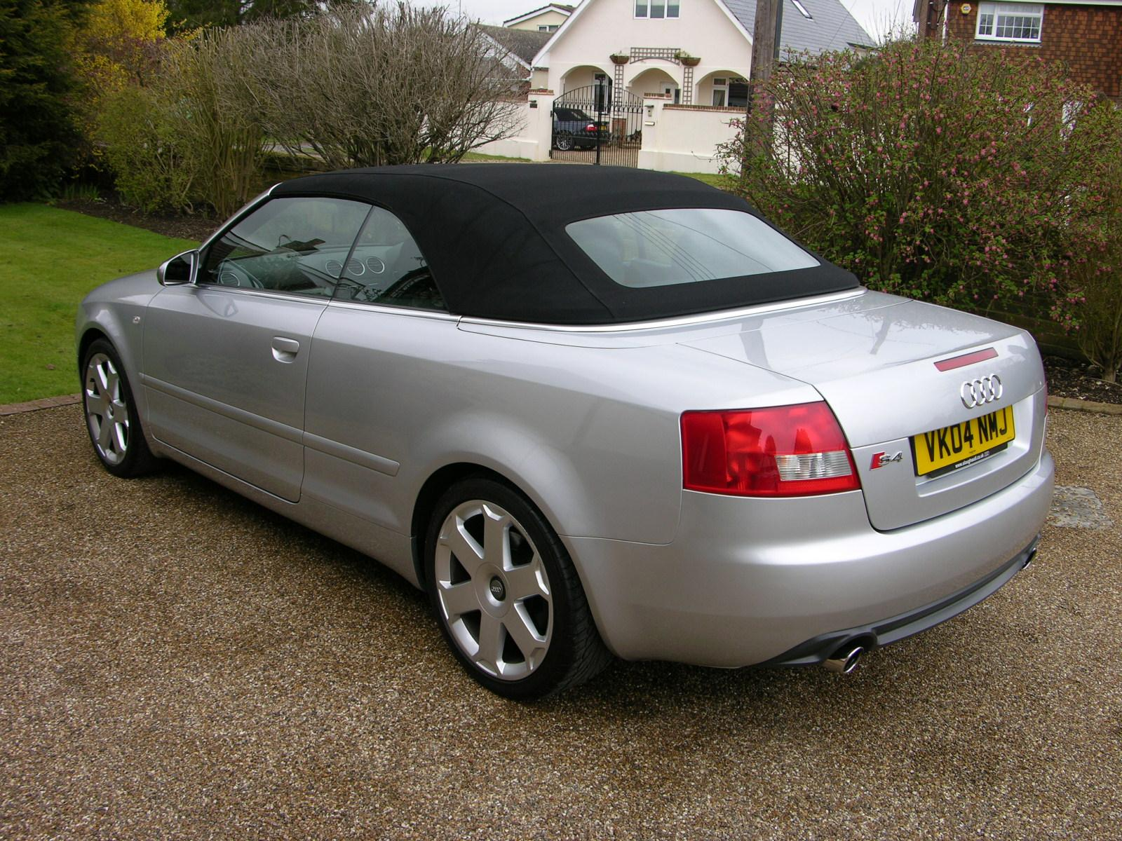 Audi S4 Cabriolet